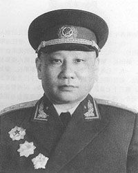 唐亮上将，中国人民解放军开国上将。